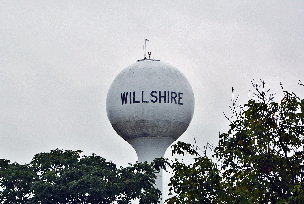 Willshire water tower